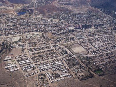 Vista Aerea Comuna de Andacollo